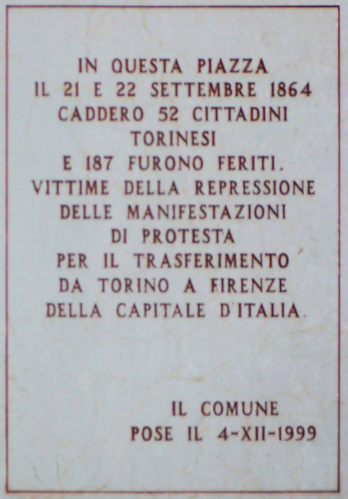 Targa commemorativa delle vittime di Torino del 21-22 settembre 1864